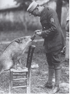 Sanglier